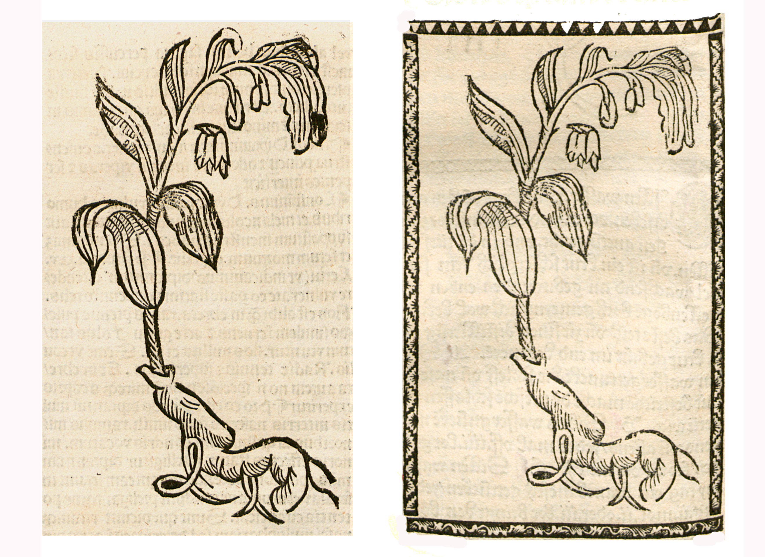 Abbildung von: Weisswurz